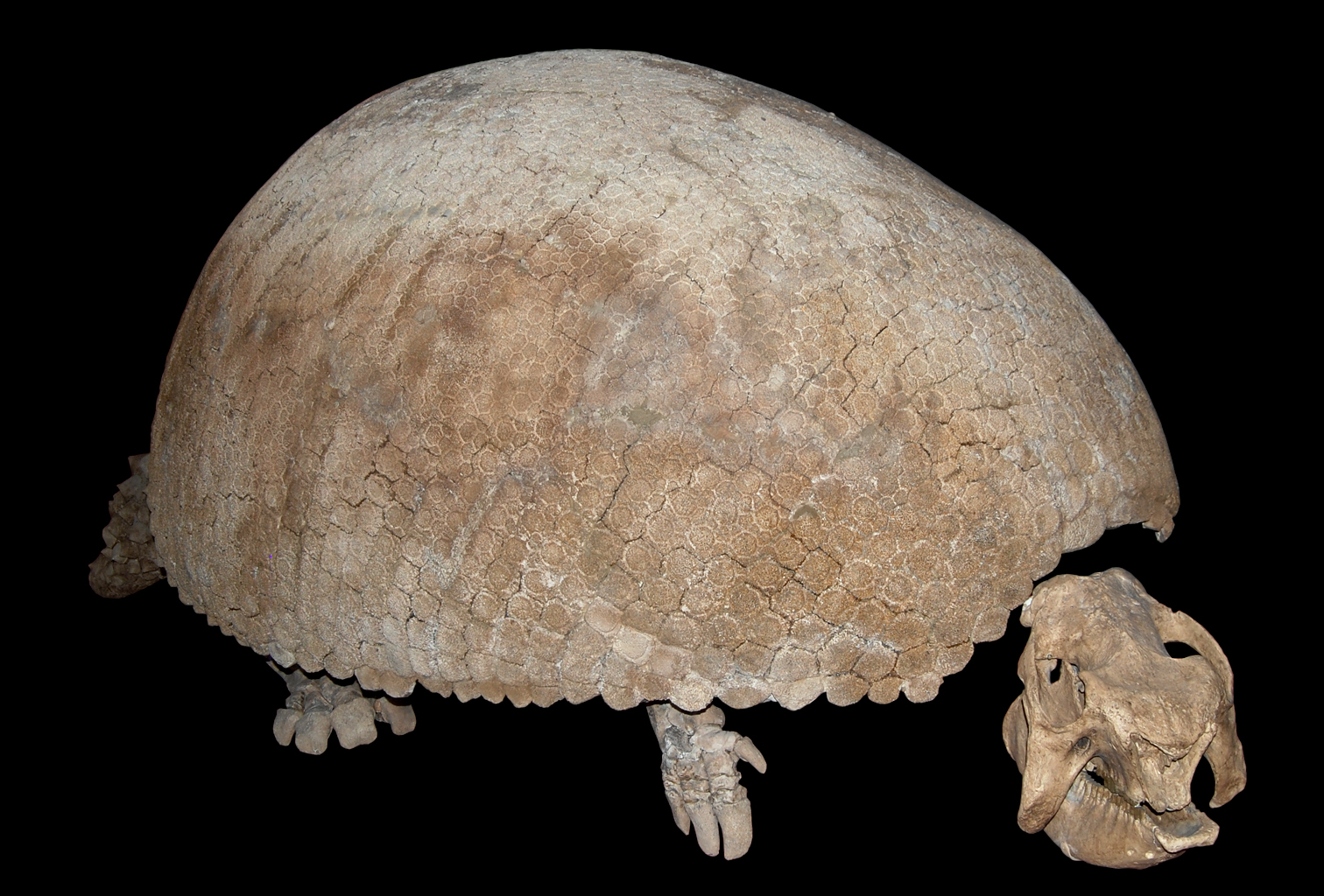 Naturhistorisches Museum Wien